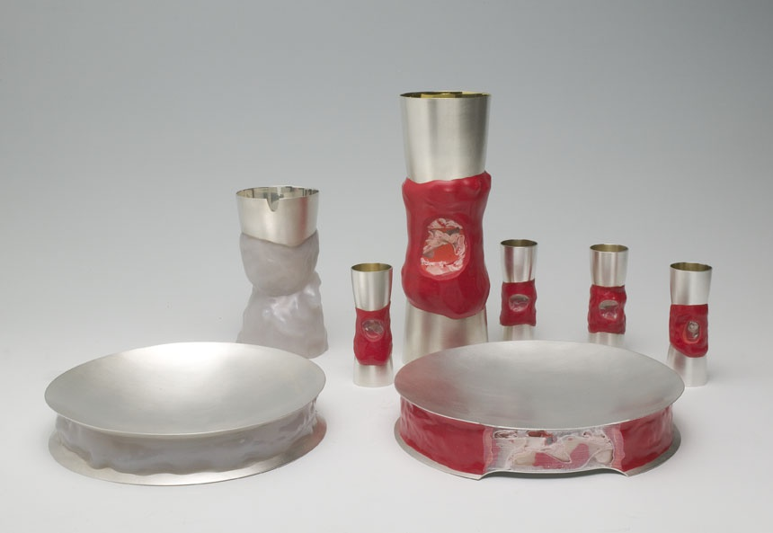 Doop- en avondmaalset Ruudt Peters, 2005 RMCC v887a-h Deze bekers en schalen zijn zowel naar boven als naar onderen gelijk van vorm; ze verbeelden respectievelijk de hemel, God, en de aarde, de mens. De inspiratie voor zijn ontwerp haalt Ruudt Peters uit het Onze Vader, het belangrijkste gebed van christenen: ‘zoals in de hemel, zo ook op aarde’. Waar ‘hemel’ en ‘aarde’ elkaar raken zijn giethars en textiel aangebracht: transparant voor de doopset en rood voor de avondmaalset. Het rood verwijst naar het lichaam en bloed van Christus. In het vieren van eucharistie of avondmaal herdenken christenen zijn dood en opstanding.